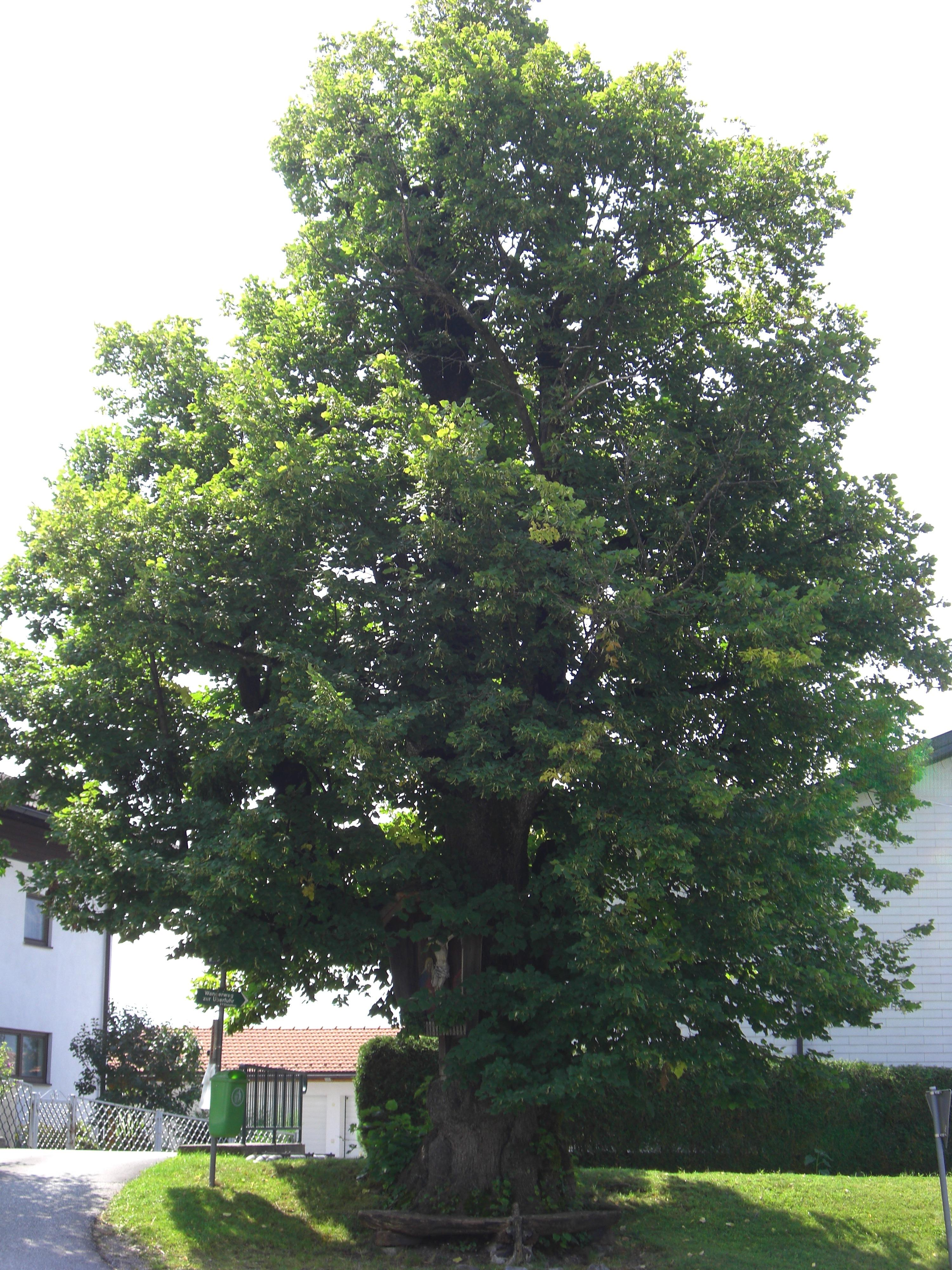 Linde beim alten Feuerwehrhaus in Elsbethen This media shows the natural monument in Salzburg with the ID NDM00210.